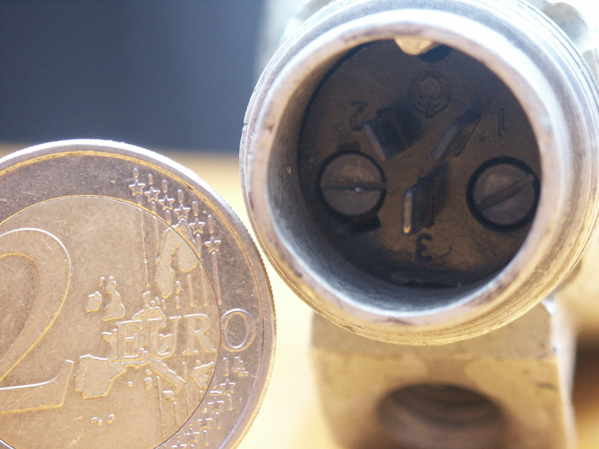 Der Groß-Tuchelstecker im Größenvergleich